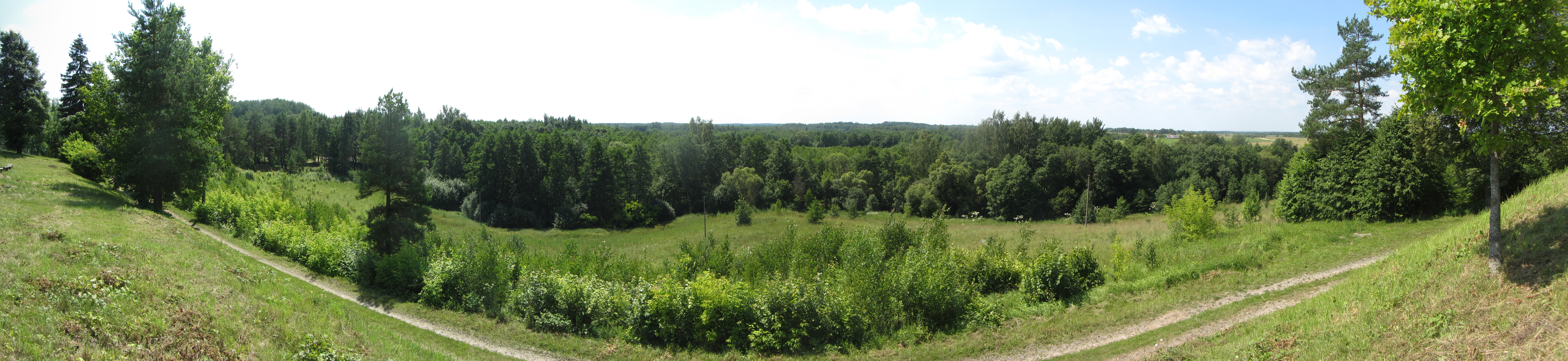 Rimšės sen., Lithuania